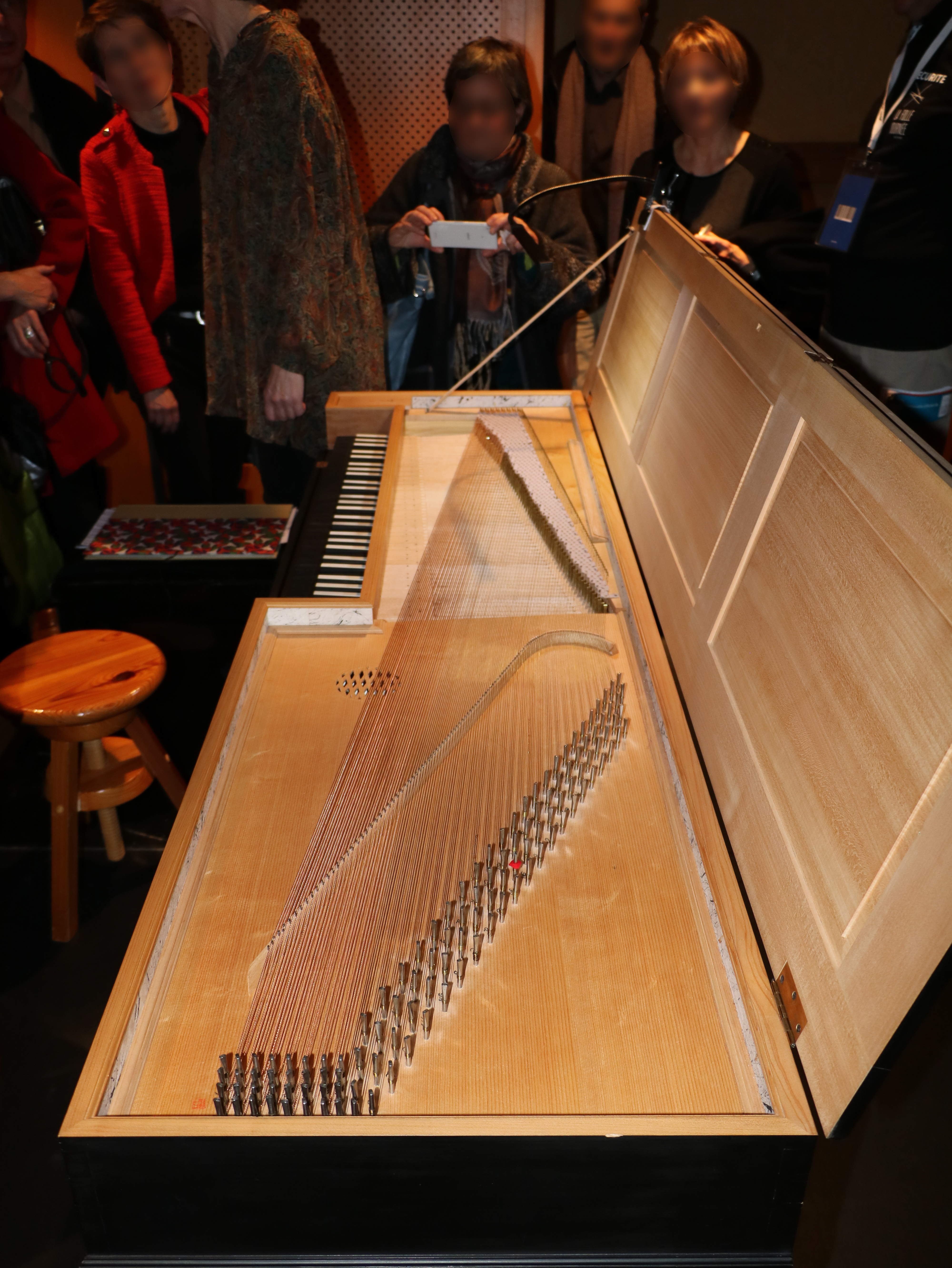 Clavicorde de Jocelyne Cuiller, la Folle journée, 1er février 2017.